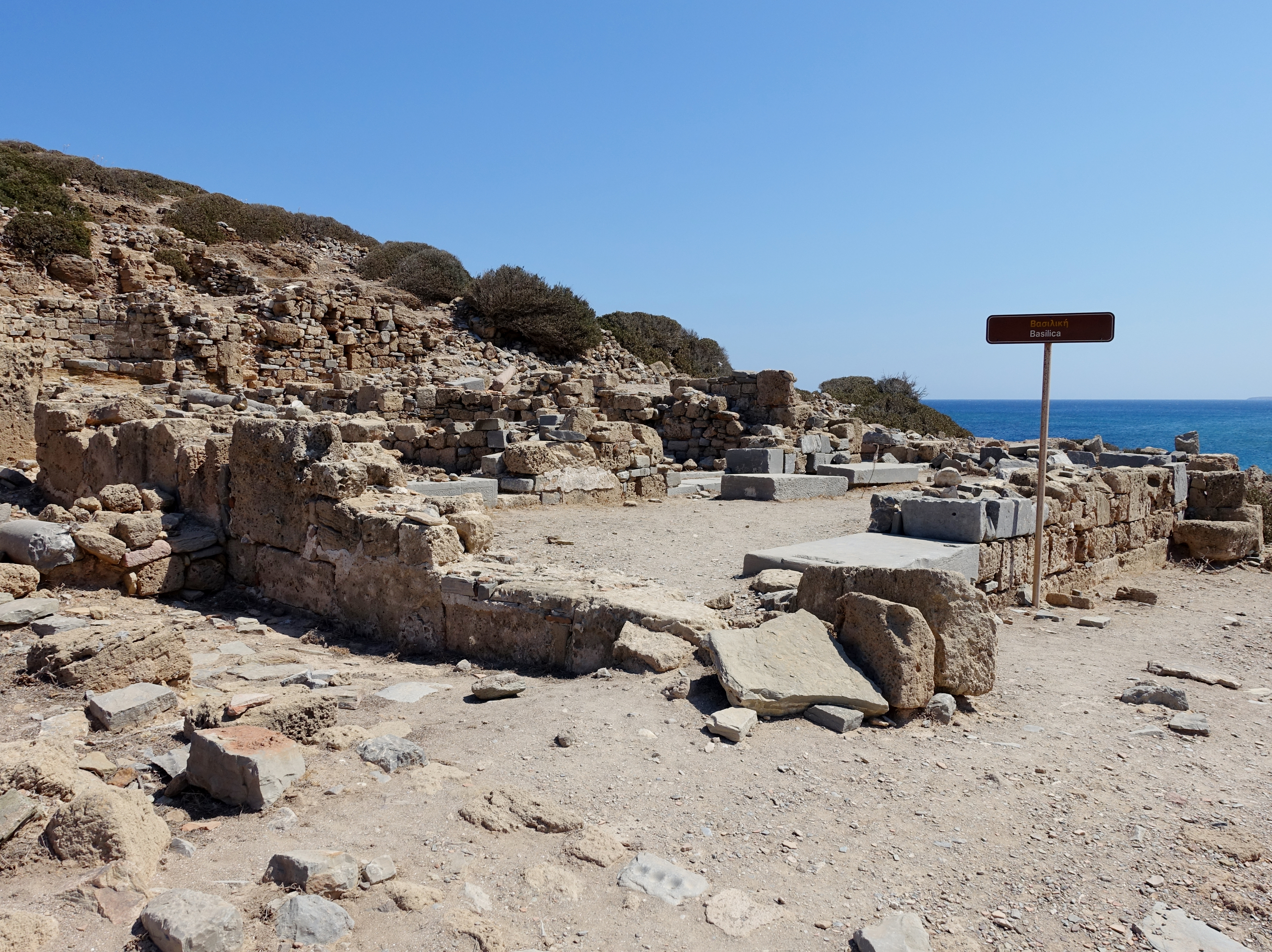 Basilika von Itanos (Ίτανος) an der Nordostküste Kretas, Gemeinde Sitia, Kreta, Griechenland